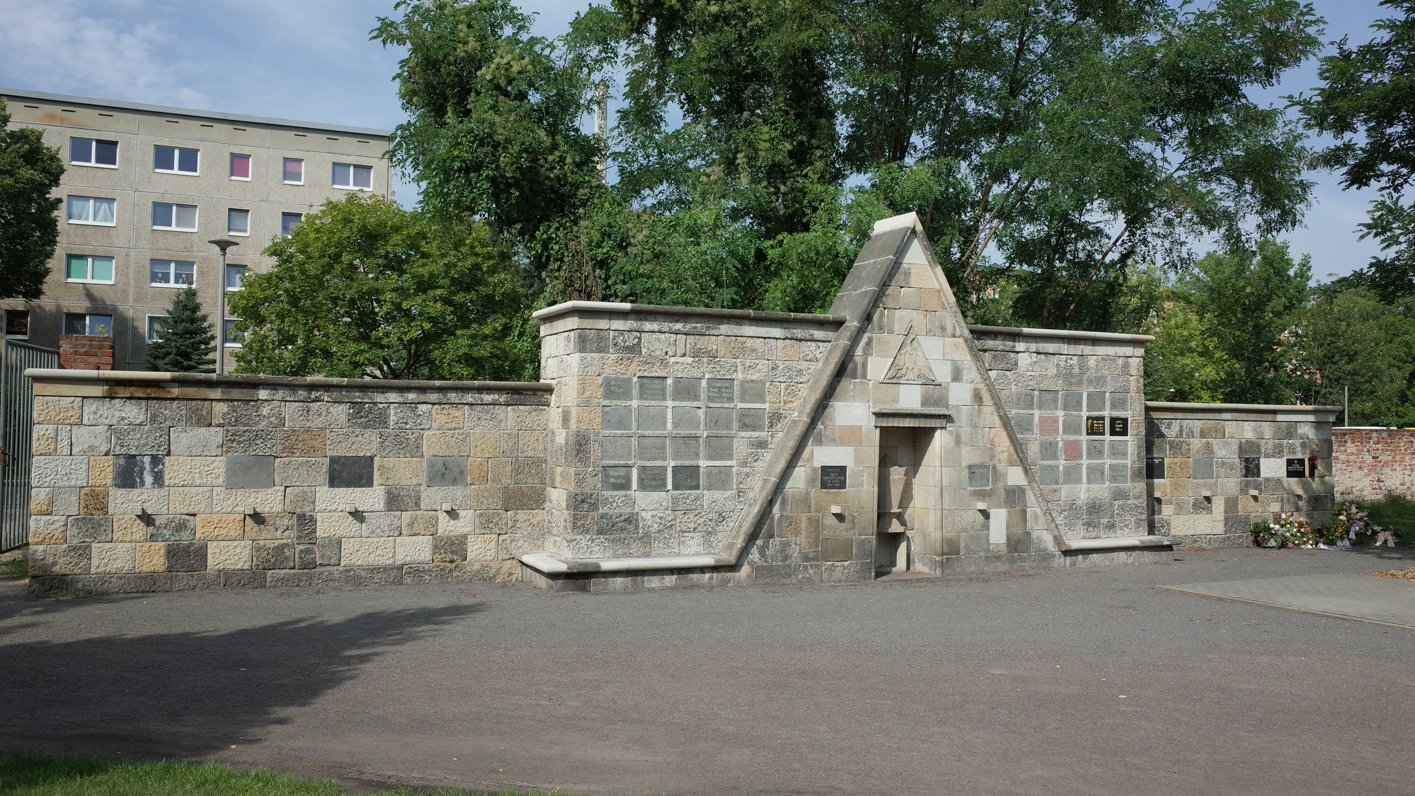 Dessau-Roßlau, Friedhof 1. Ruhestätte von Edith Dinkelmann im von ihr entwurfenen Portal-Kolumbarium.[1]